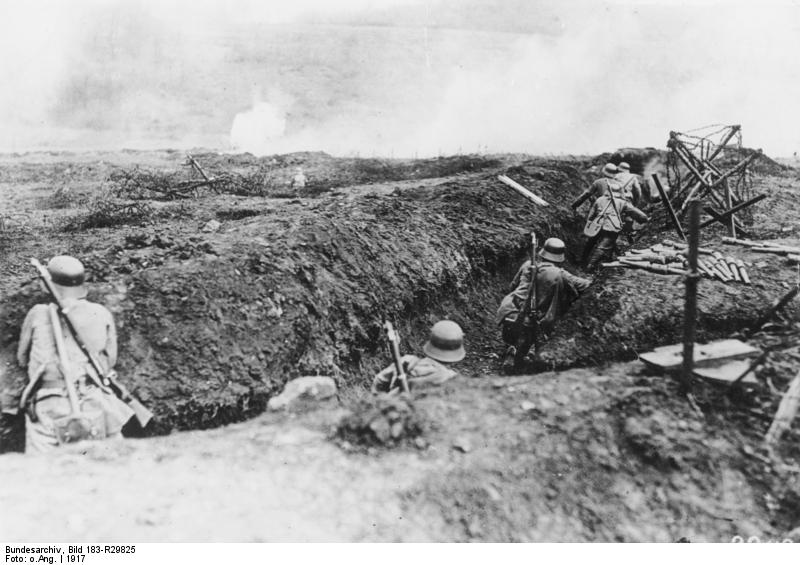 ADN-ZB-Archiv I. Weltkrieg 1914-18 An der Westfront 1917. Deutscher Stosstrupp erwartet das Zeichen zum Sturm. 8981-17 [Scherl Bilderdienst]